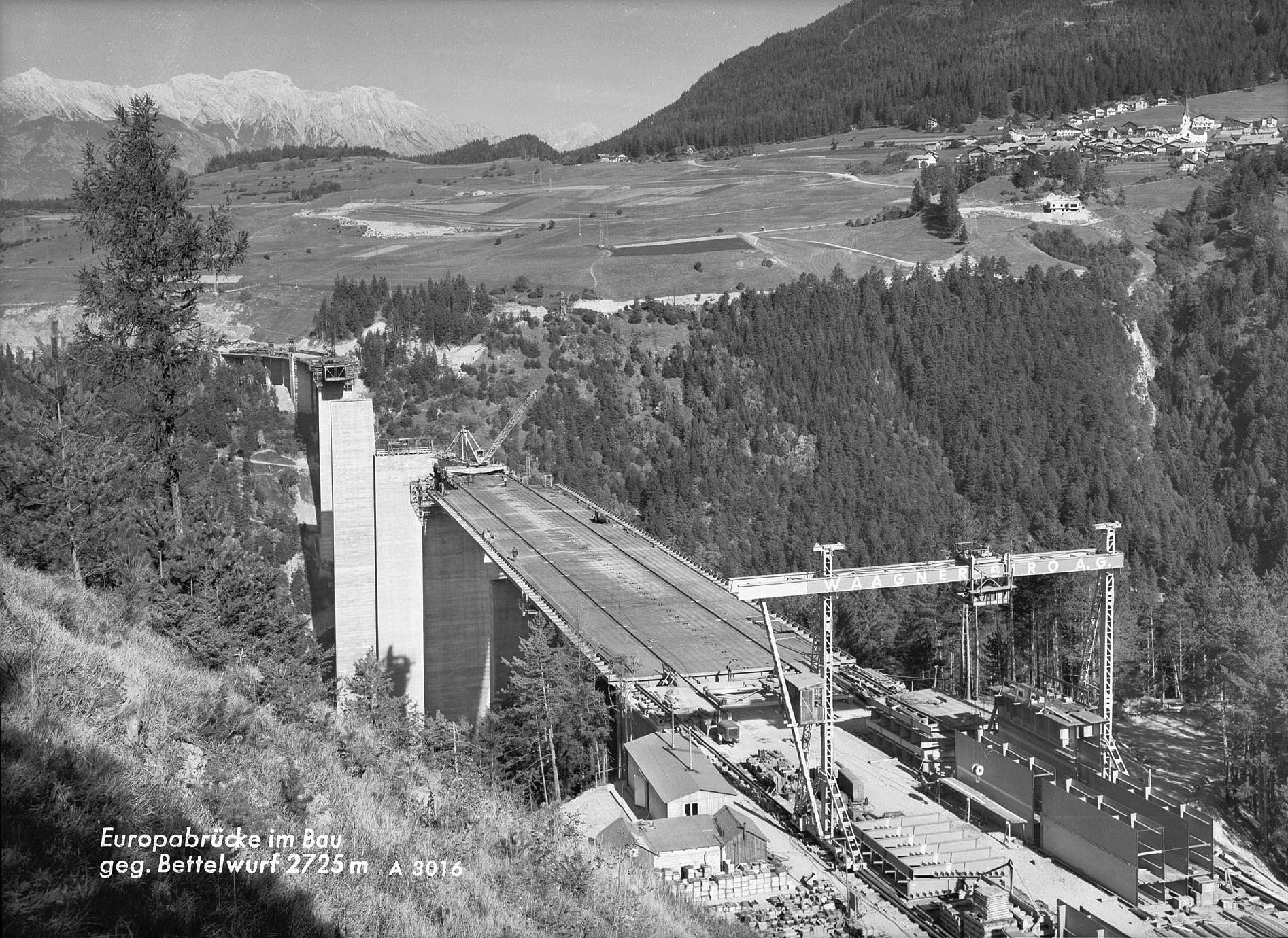 Europabrücke im Bau gegen Bettelwurf